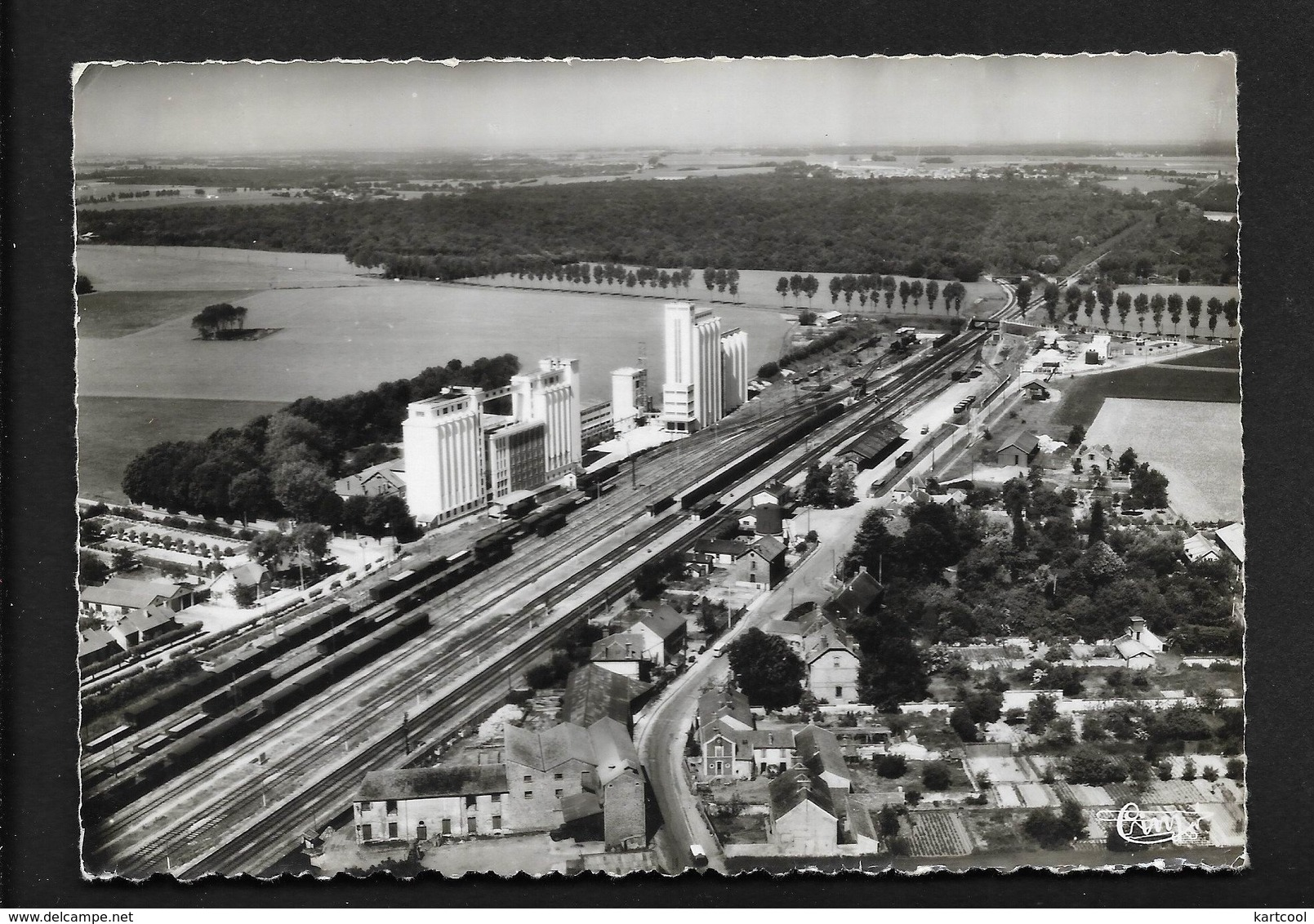 Vue aérienne de la gare de Verneuil-l'Étang, Seine-et-Marne, France, dans les années 1940.